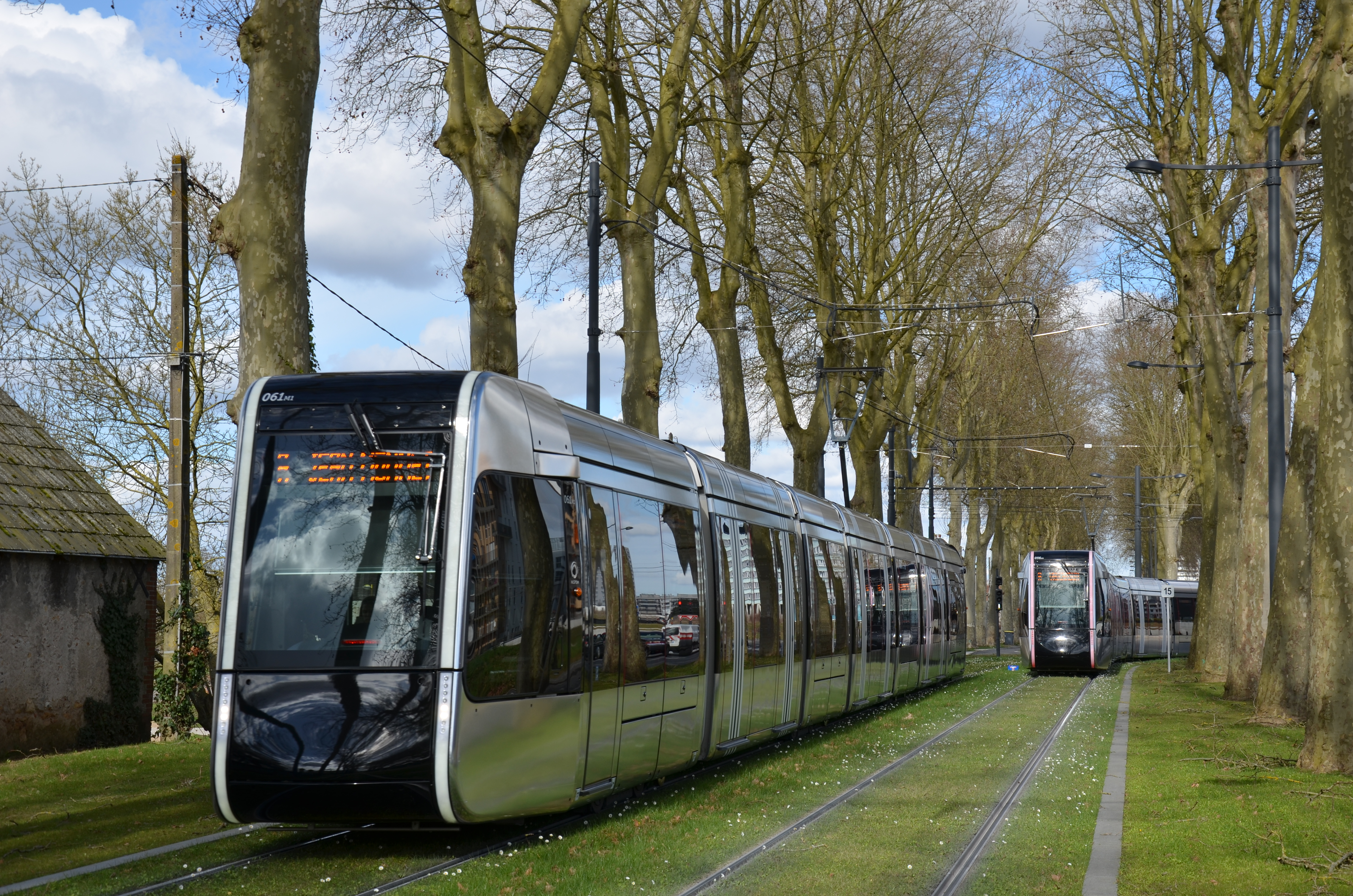 Croisement d'Alstom Citadis 402 n°061 et 056 sur la ligne A du tramway du réseau Fil Bleu de Tours, près de la station Pont Volant.